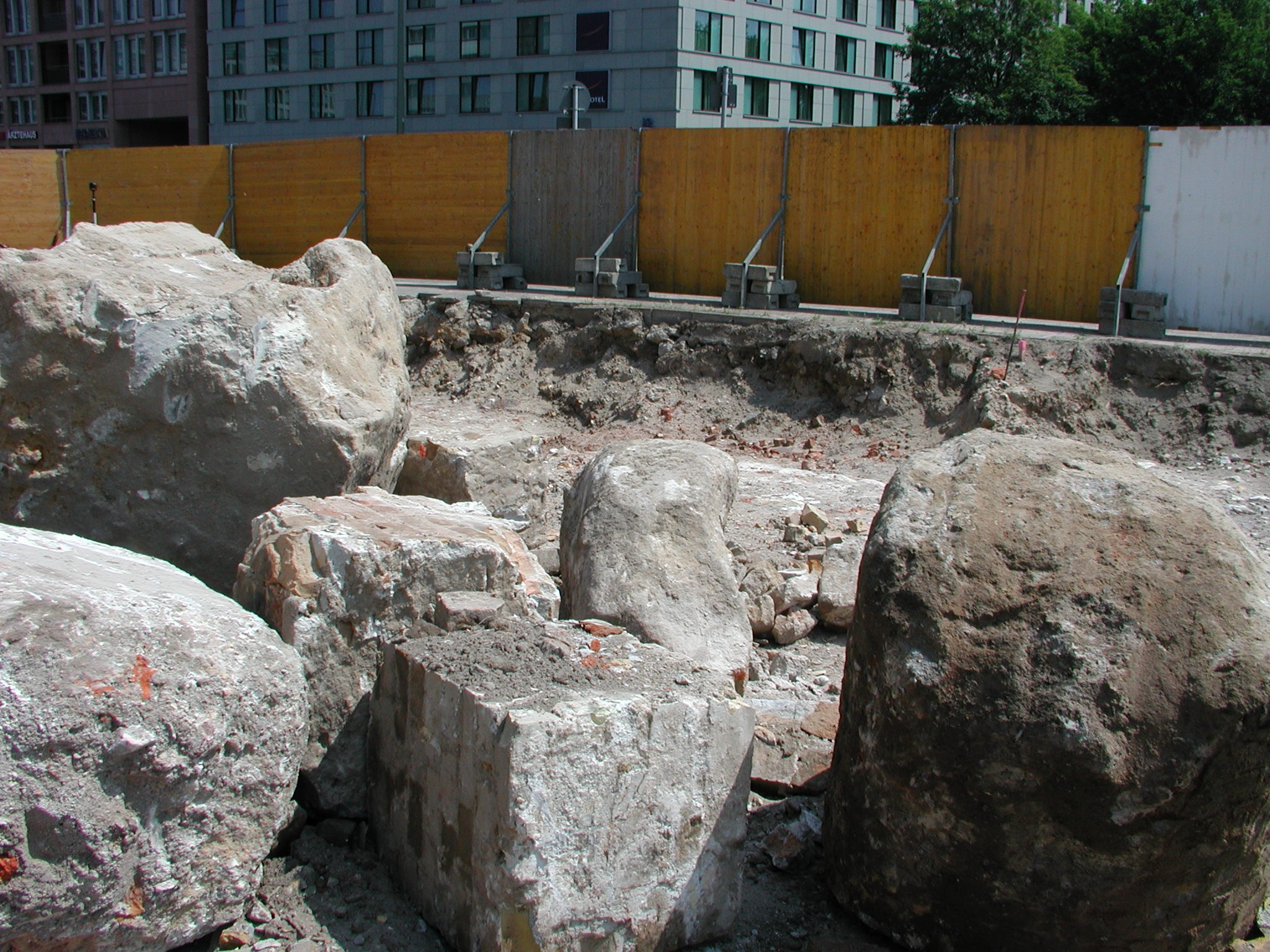 Petrikirche Berlin_Grabungen 2007: Fundamentreste